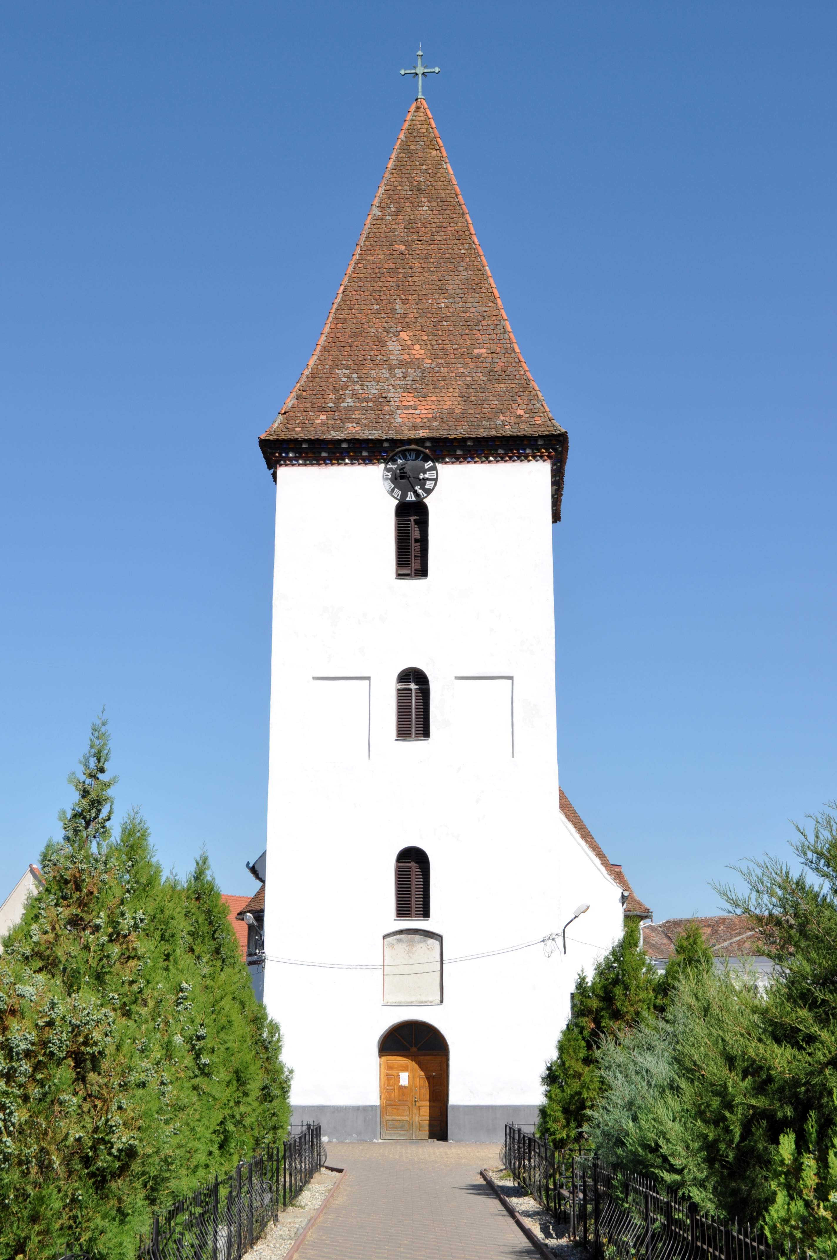 Biserica "Înălţarea Domnului" , oraş SĂLIŞTE